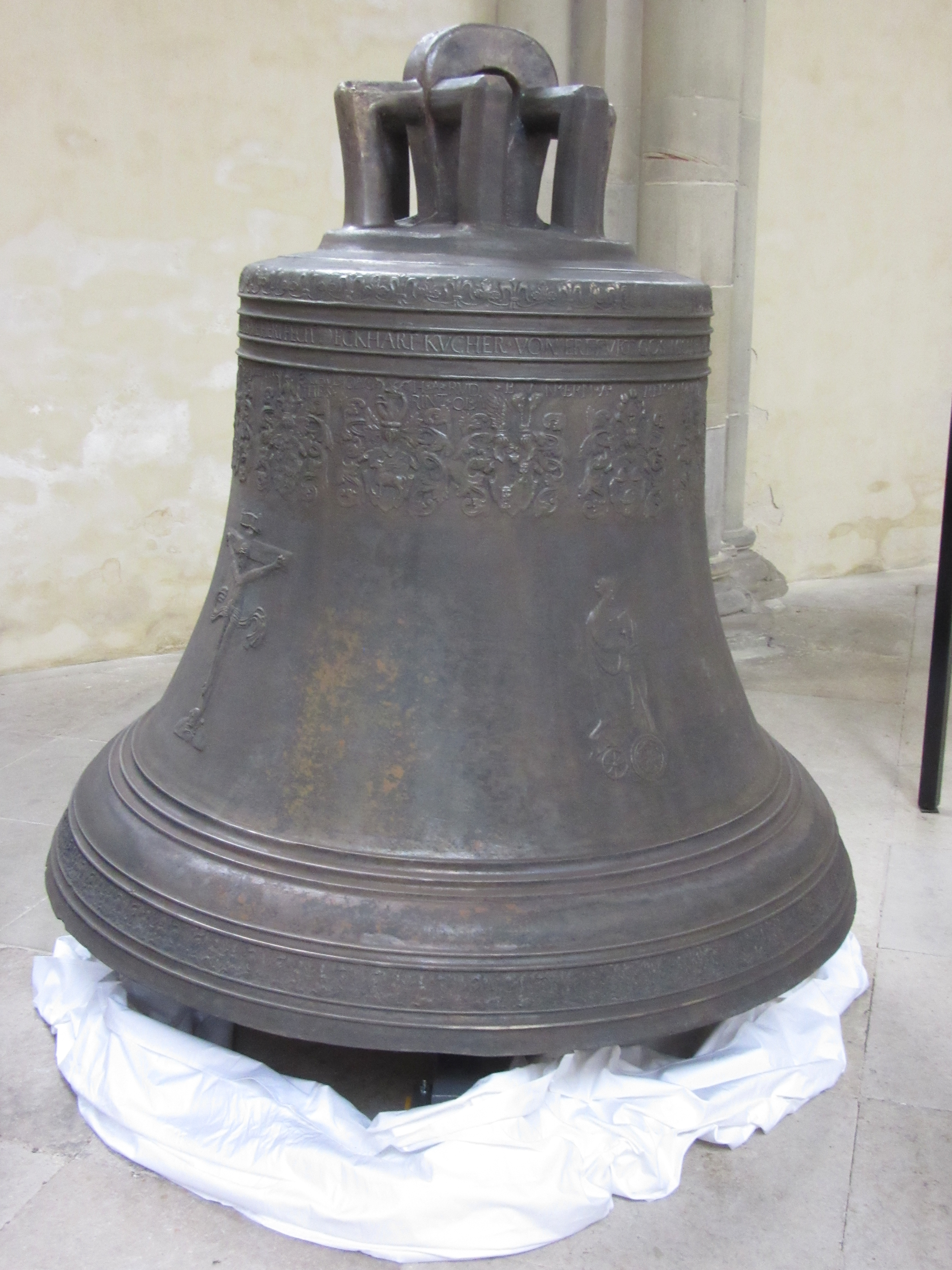 Dominica, Sonntagsglocke des Magdeburger Doms